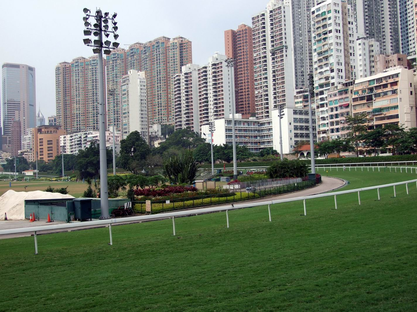 跑馬地馬場草地跑道